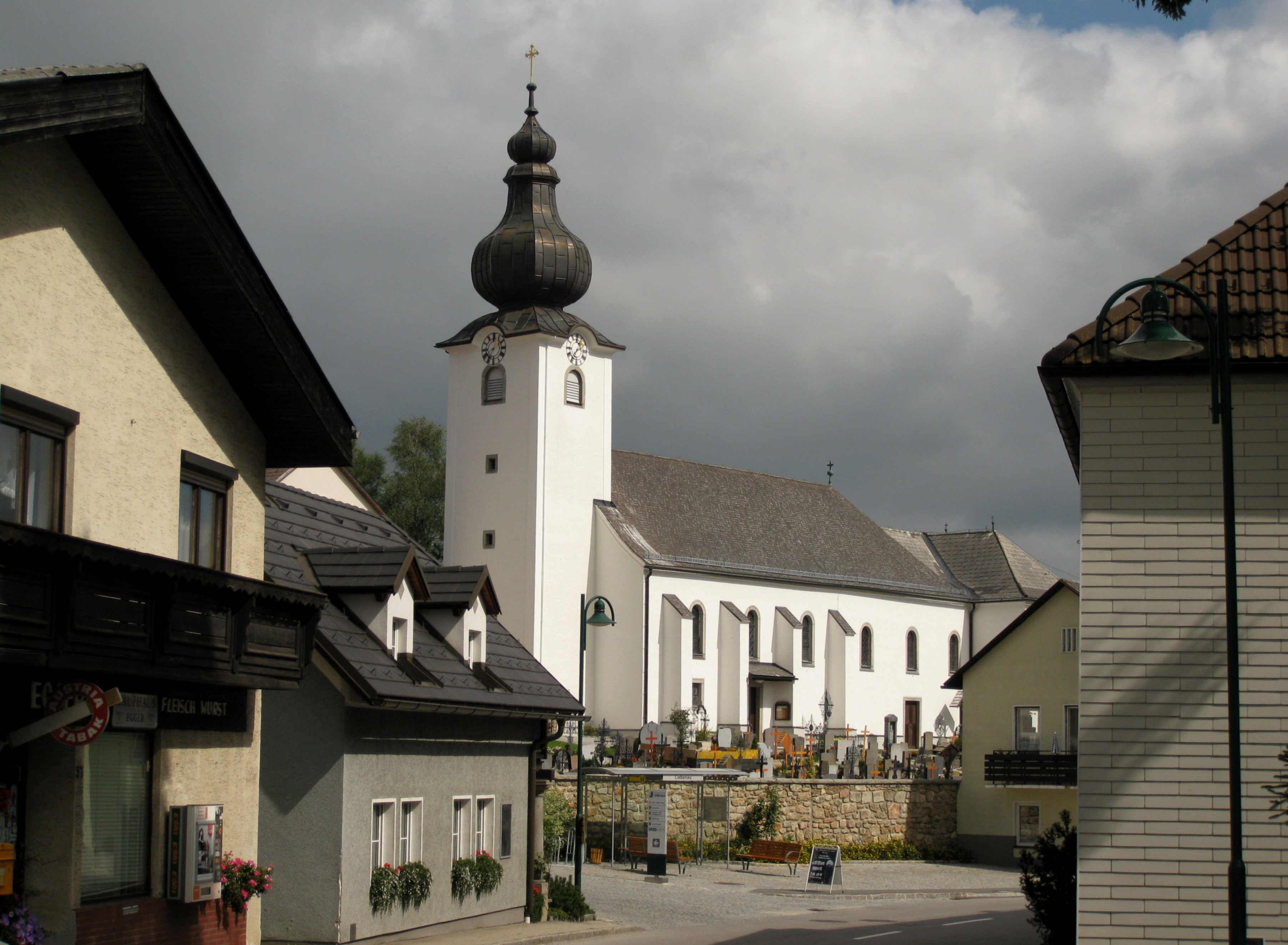 Kath. Pfarrkirche hl. Josef